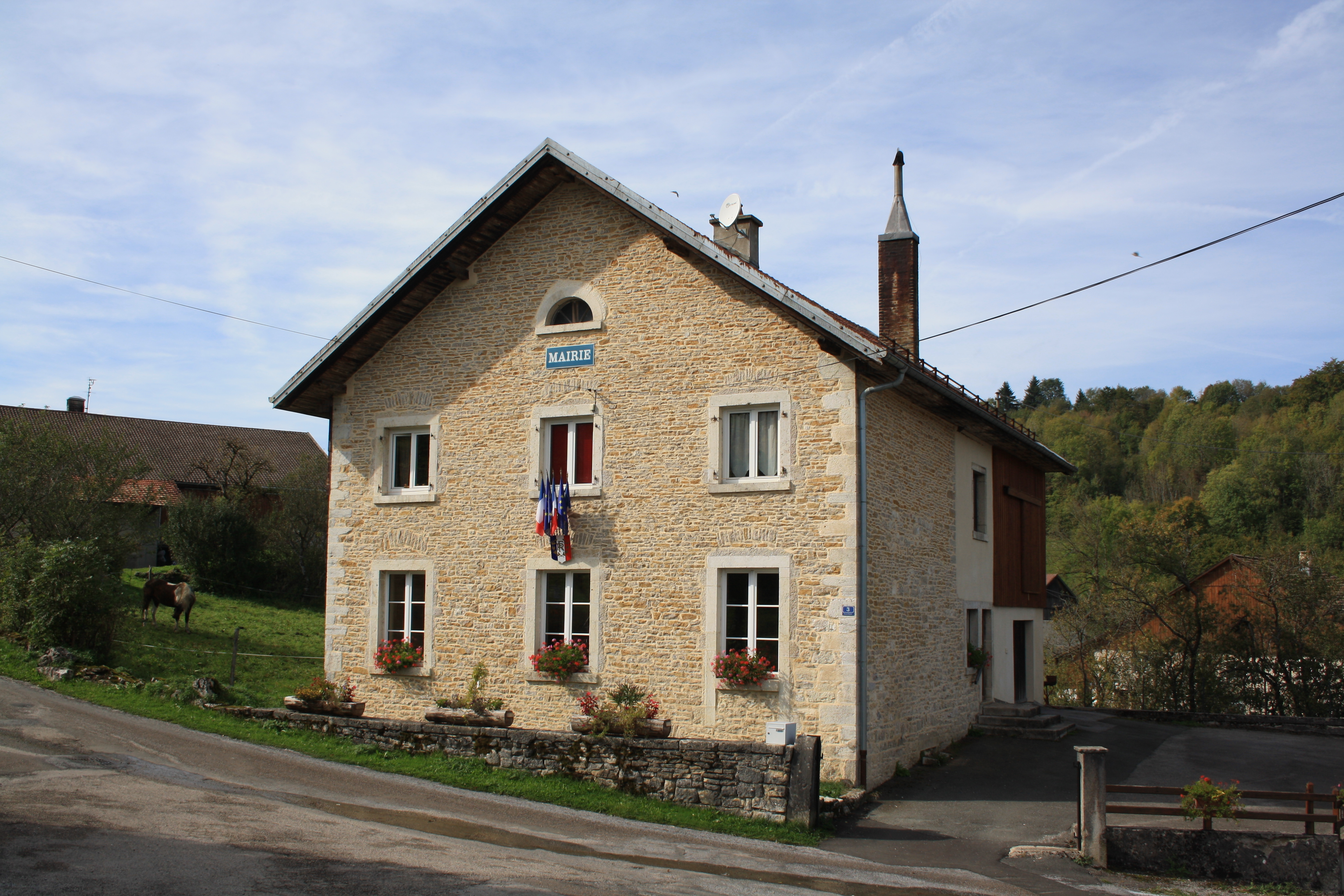 Mairie (Rathaus) von Fessevillers